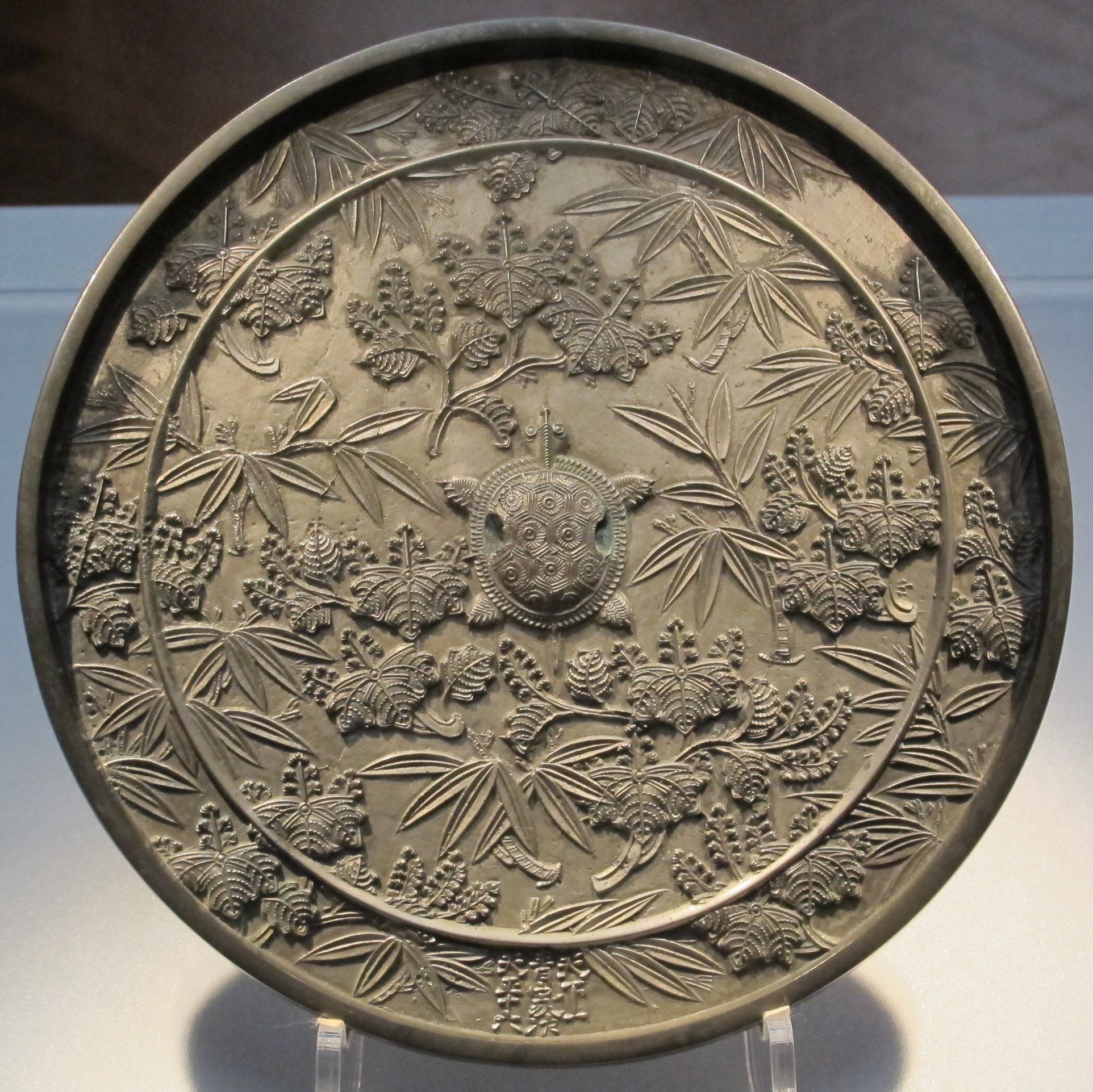 桐竹鏡、鋳出銘「天下一青家次天正十六」、1588年の作。東京国立博物館所蔵。